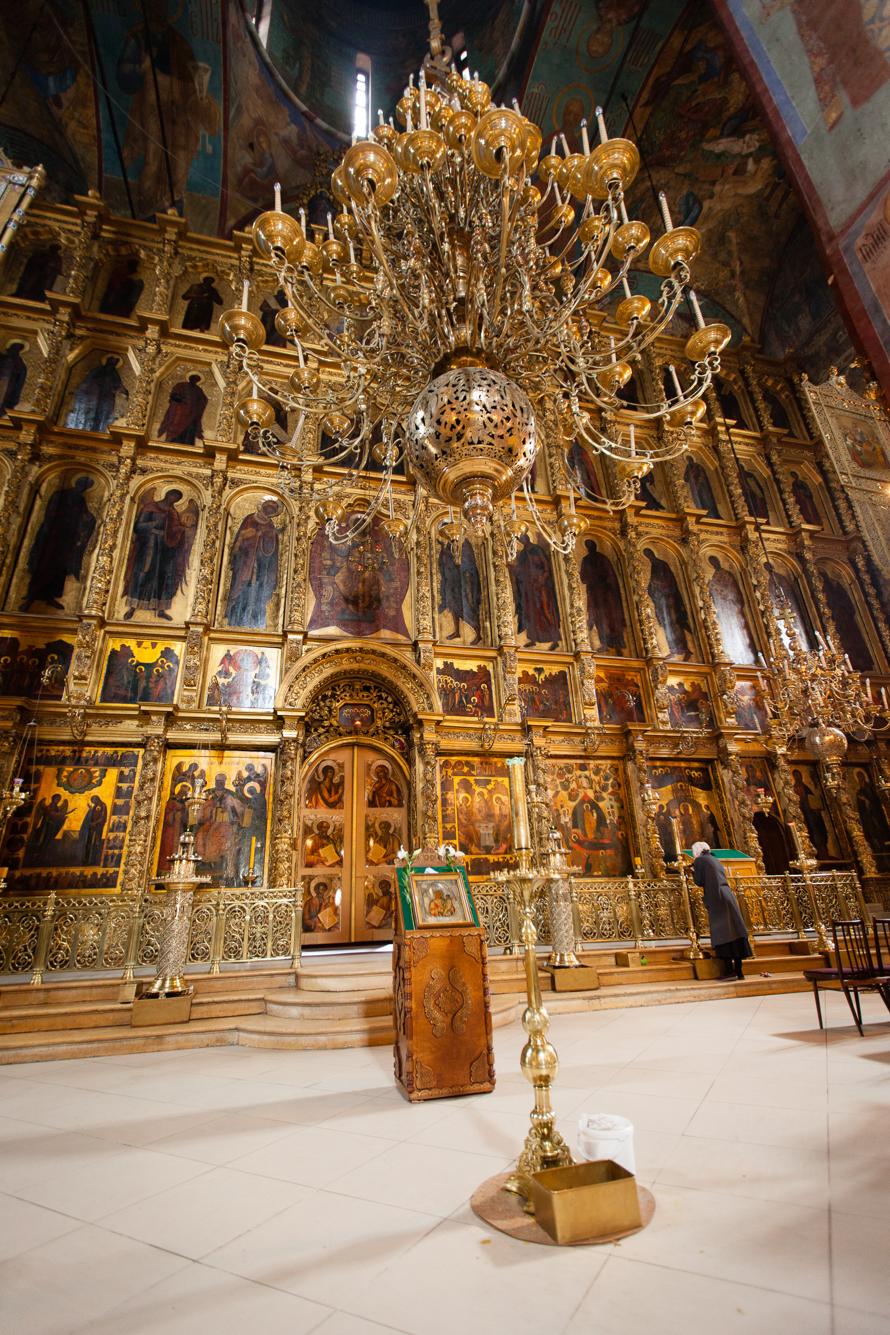 Moscow